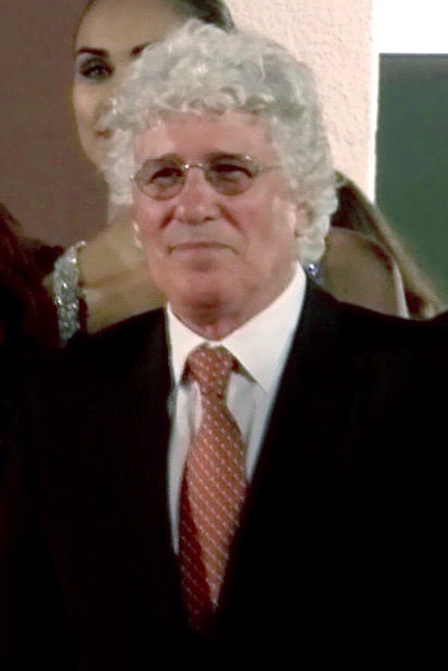 Ninetto Davoli alla premiére del film "Pasolini" nel 2014